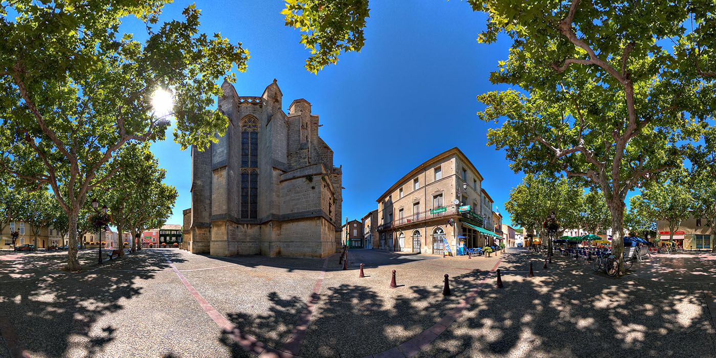 Vue panoramique 360° de la Place Jean Jaurès, vue sur l'extérieur de la Collégiale Saint-Etienne à Capestang (France) .